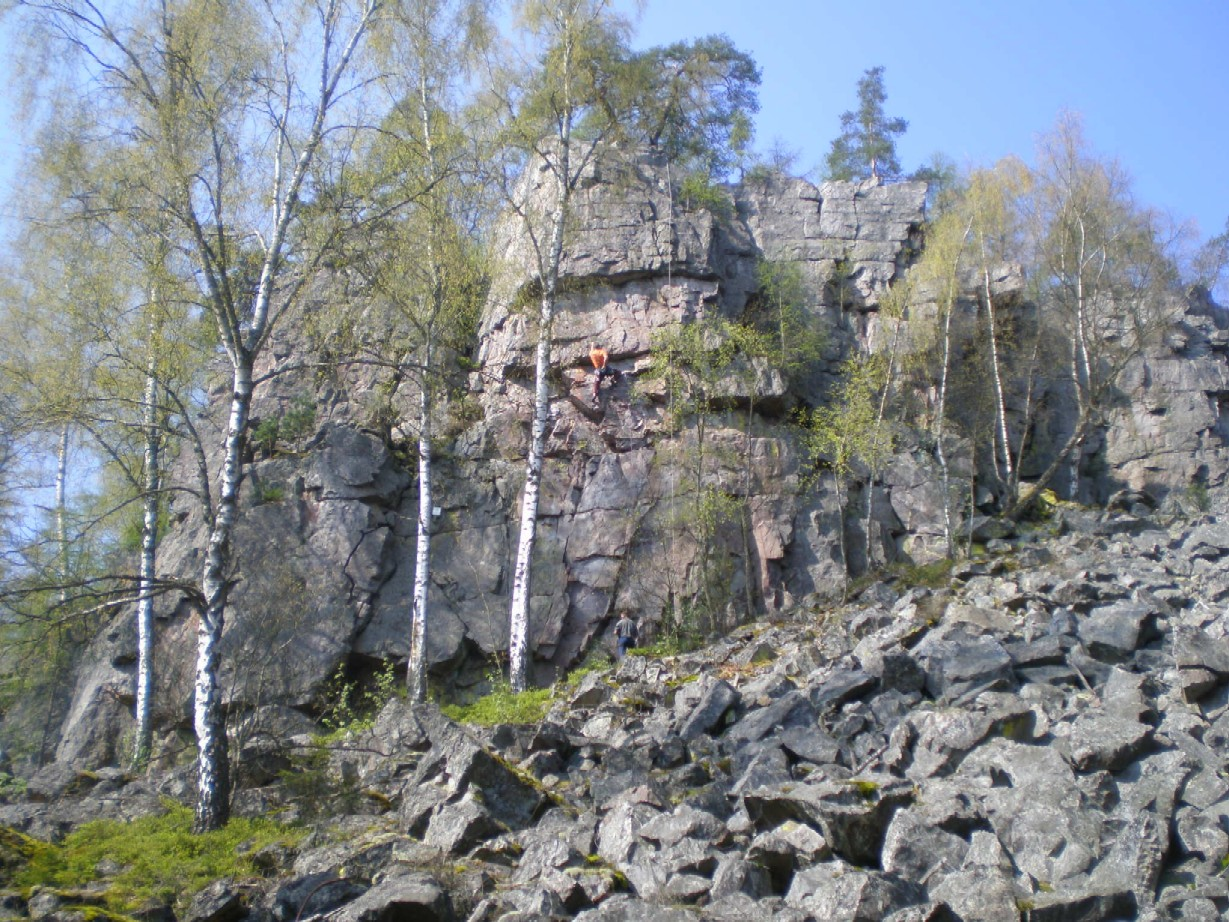 Nejmohutnější skalní útvar ve středních Brdech - Jindřichova (také Vísecká) skála.